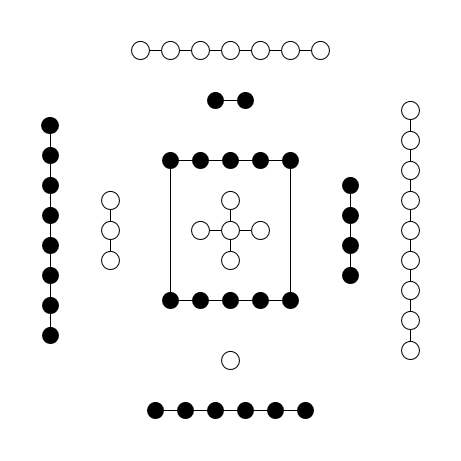 十數圖 Shishutu